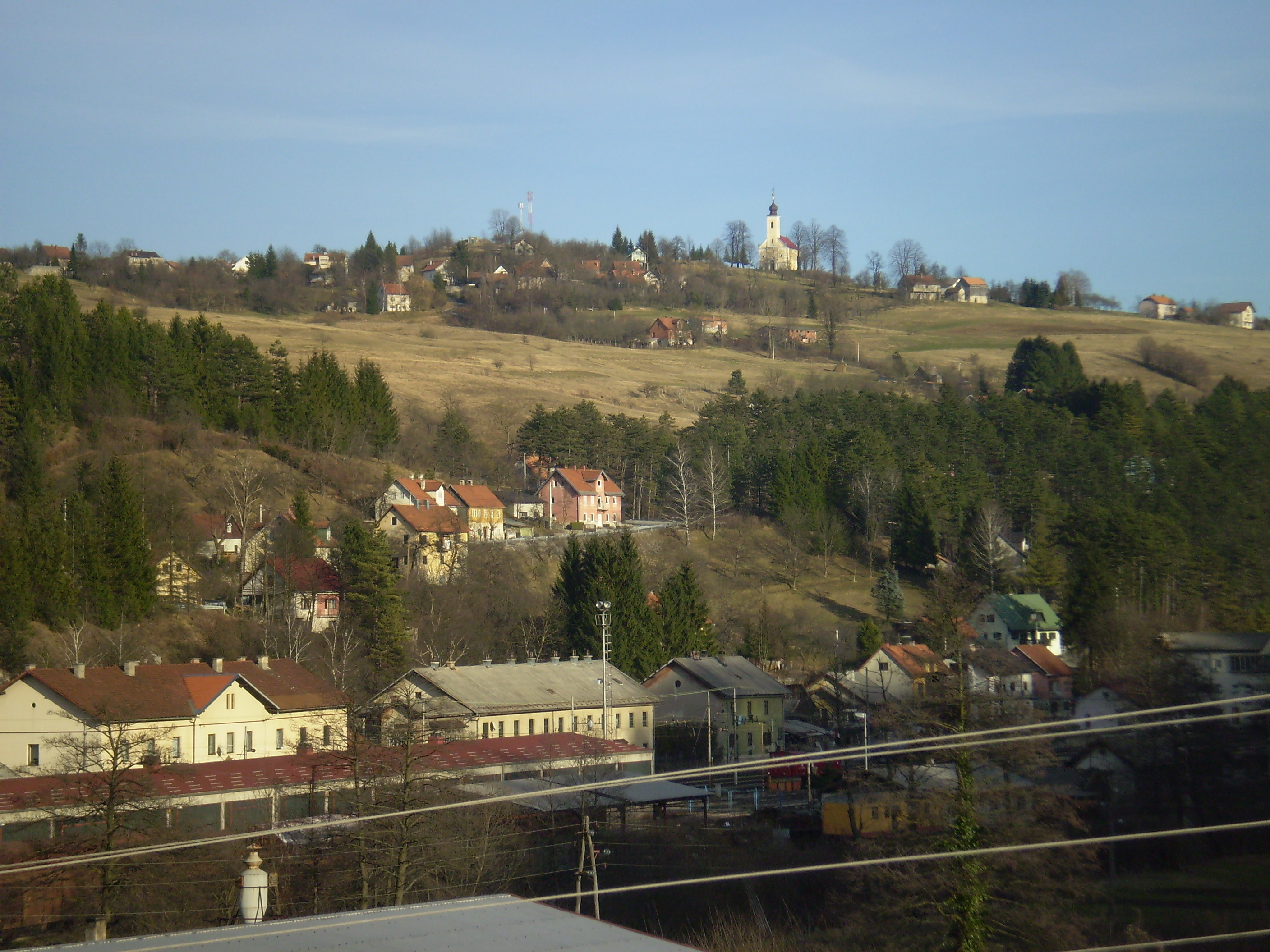 Moravice